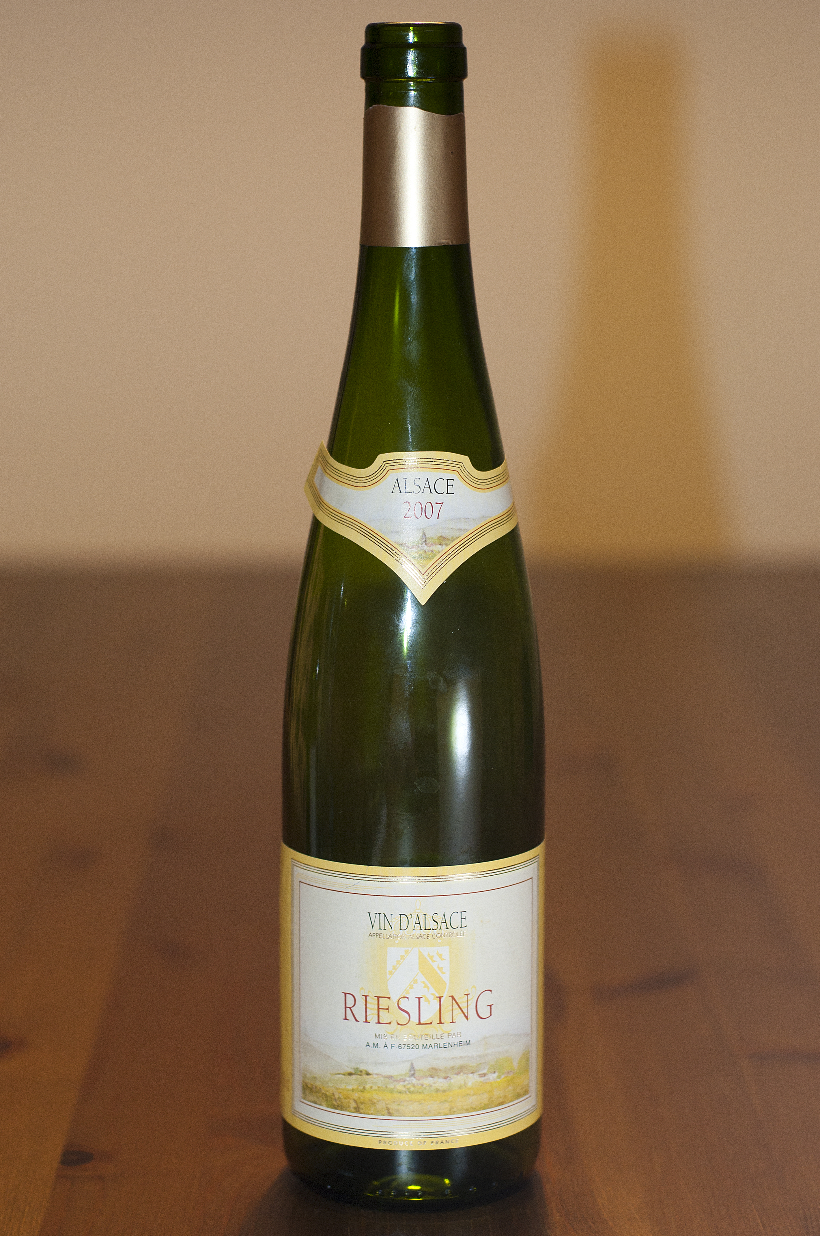 2007 Vin D'Alsace Riesling from Marlenheim, France